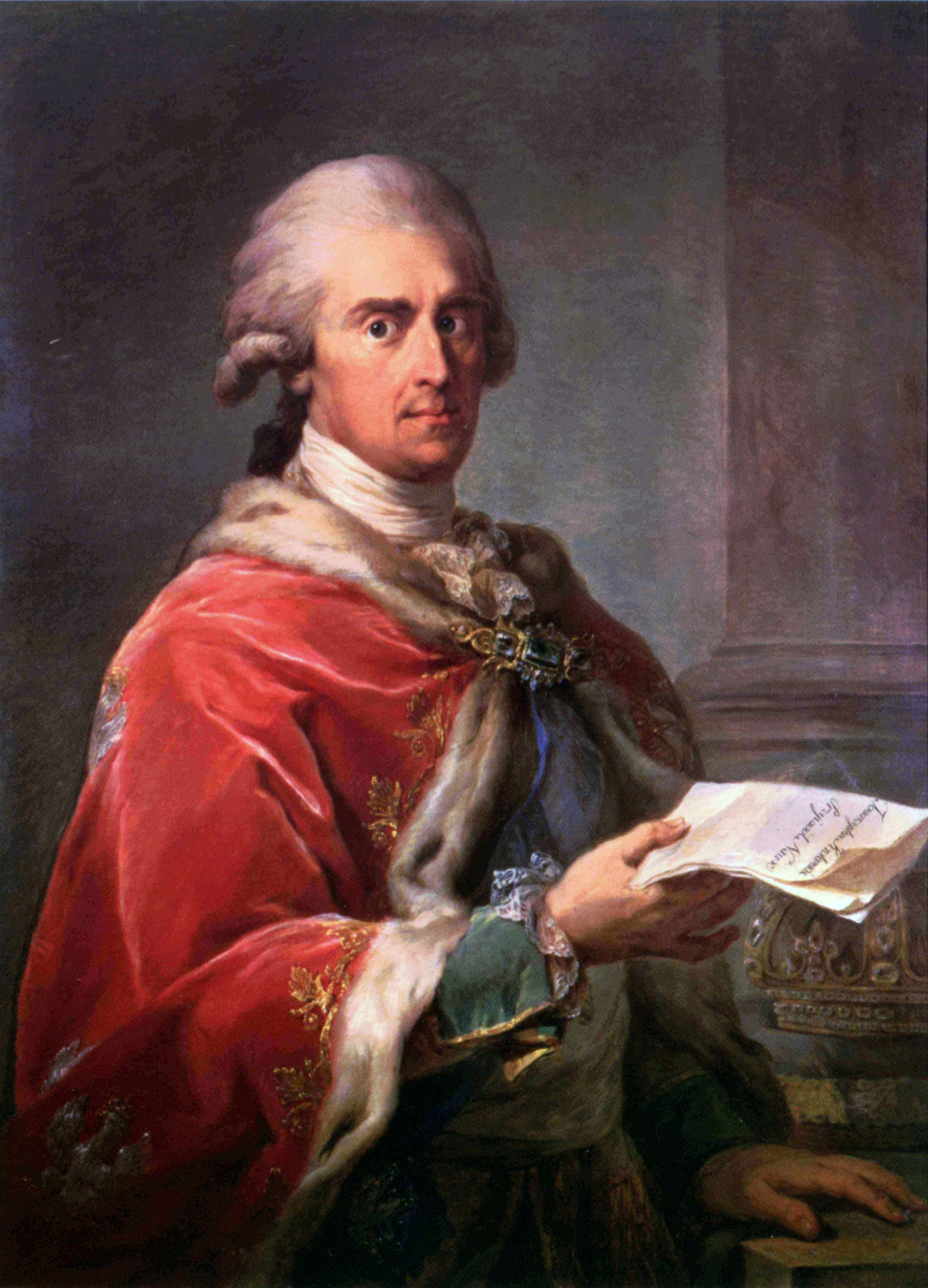 Fryderyk August (1750-1827)